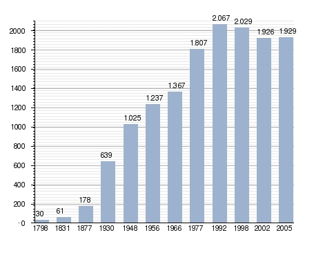 Einwohnerentwicklung, Bukarest (Rumänien)